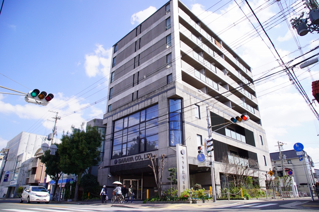 Saraya Co.,Ltd (Higashi-Sumiyoshi,Osaka,JAPAN)